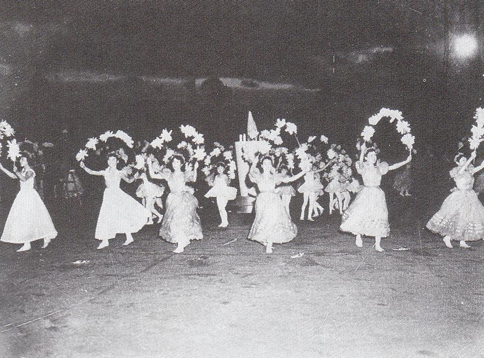 1954年6月2日、平和台野球場最初のナイトゲーム内セレモニーで行われた、アトラクション。